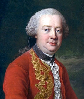 Jérôme Louis François Durazzo